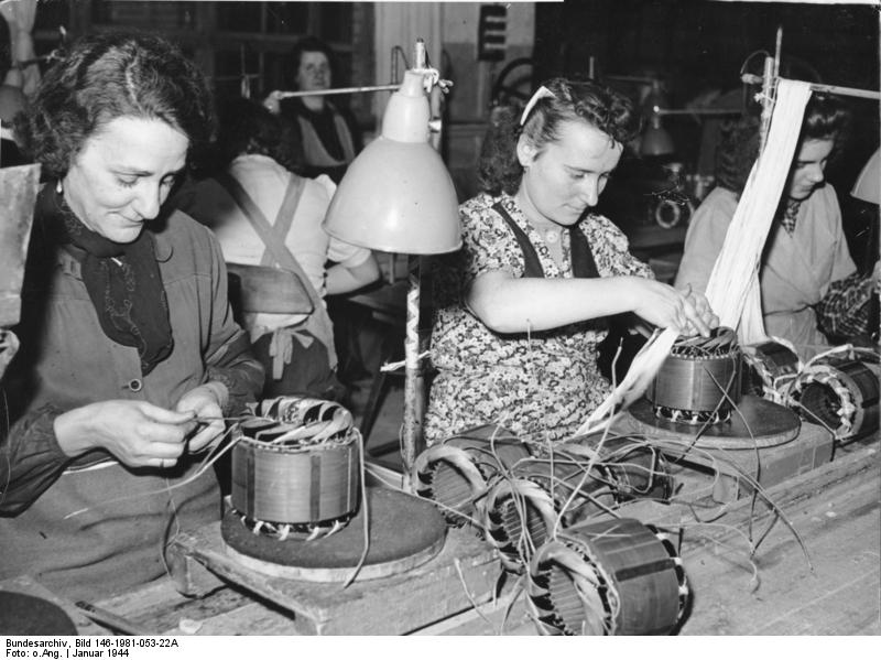 Unsere Frauen im Kreigseinsatz Sehr viele in der Kriegsindustrie vorkommenden Arbeiten werden heute von unseren Frauen ausgeführt. Wie hier sind es in erster Linie Dinge, die wegen ihrer Feinheit am besten von Frauenhänden bearbeitet werden. 12.1.1944 [Herausgabedatum]